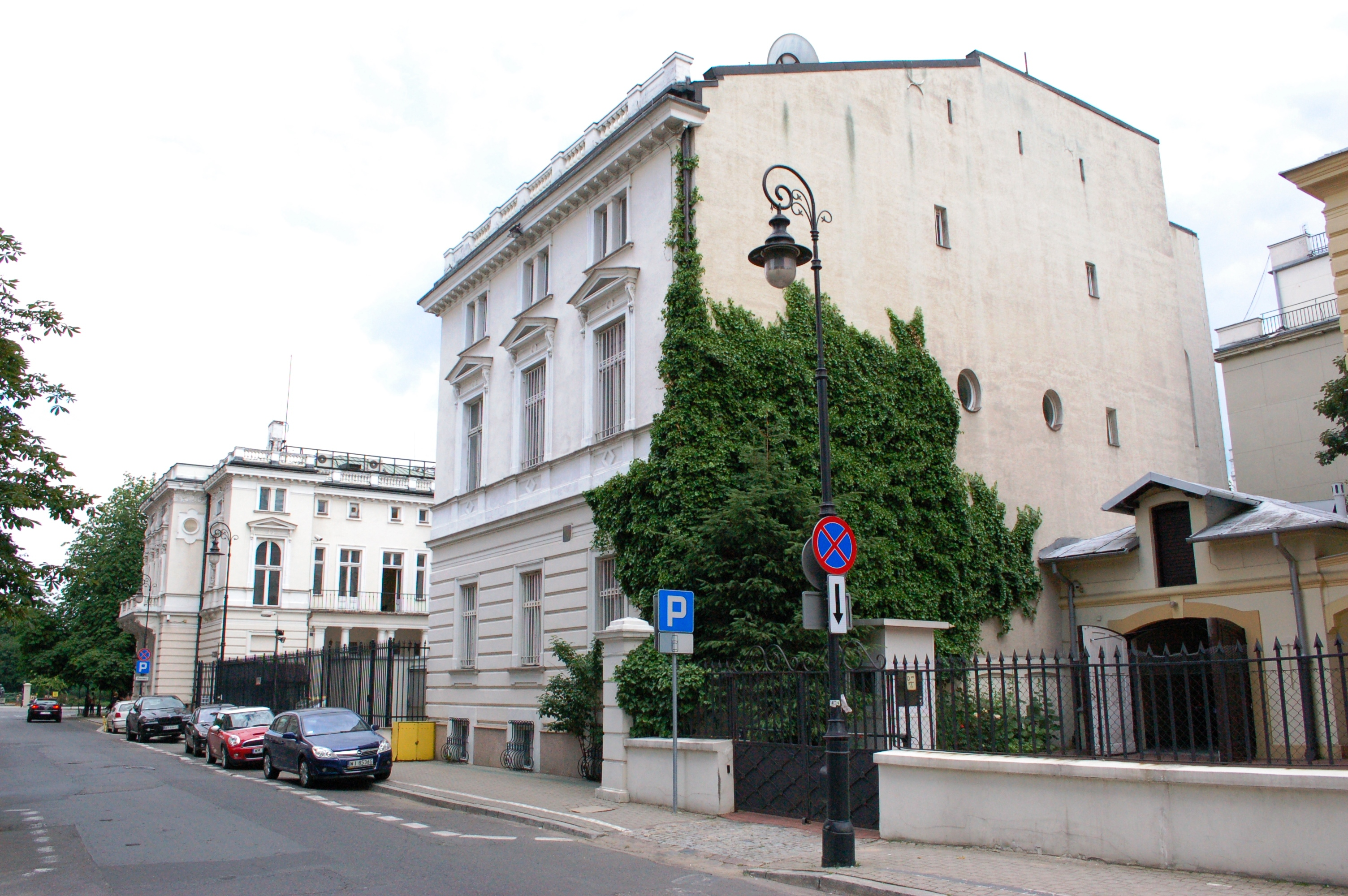 Warschau